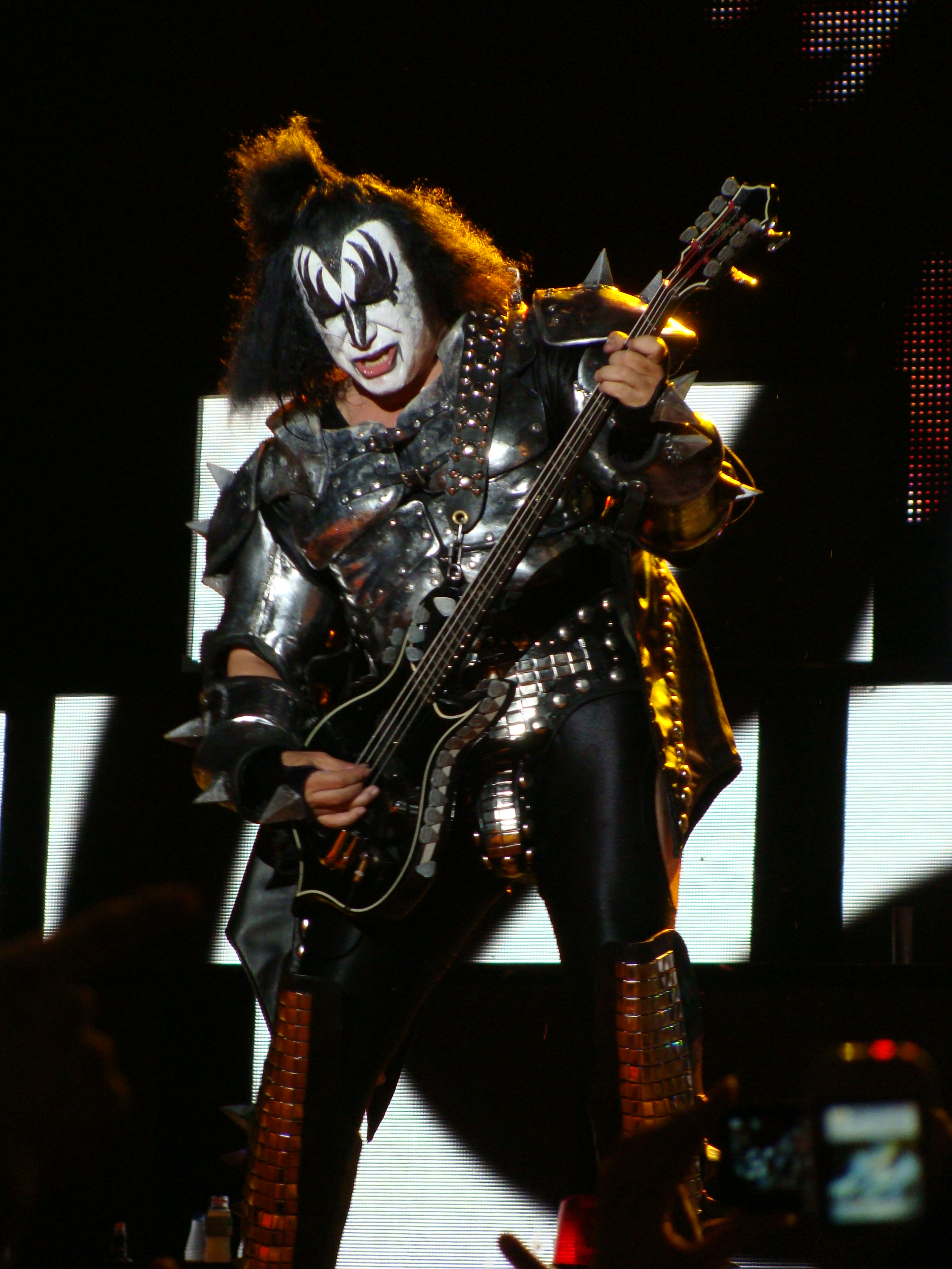 Gene Simmons, en una actuación del grupo KISS en Vitoria-Gasteiz, en el Azkena Rock Festival.